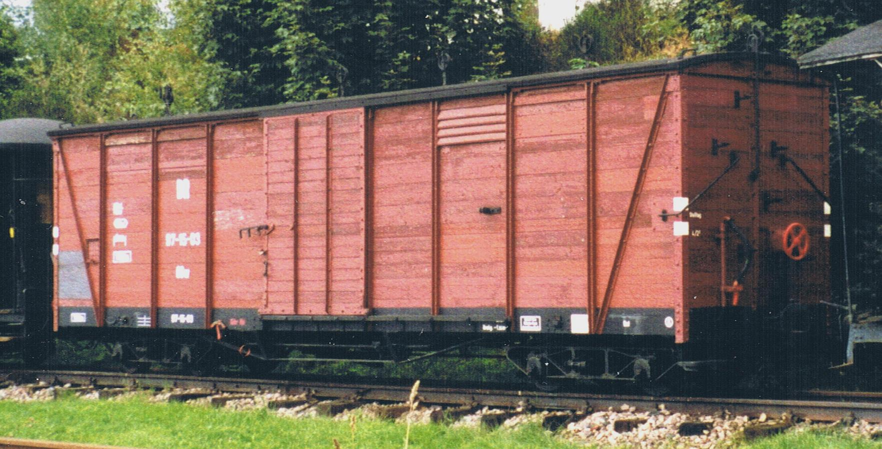 Bahndienstwagen 97-15-03 bei der Museumsbahn Schönheide; GGw der Gattung 764 gebaut 1919 in Werdau